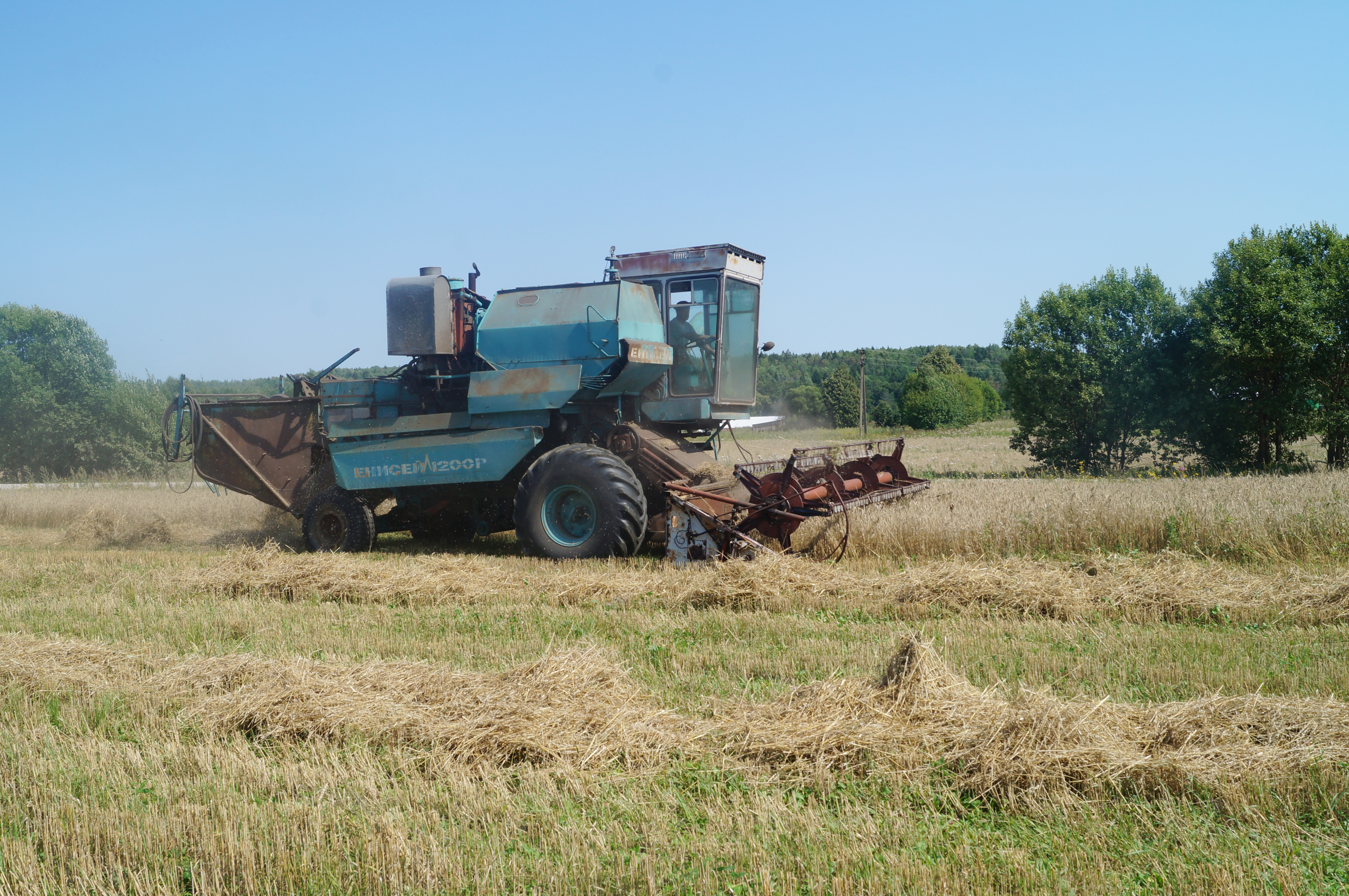 Комбайн Енисей, 2014 или 2015 год